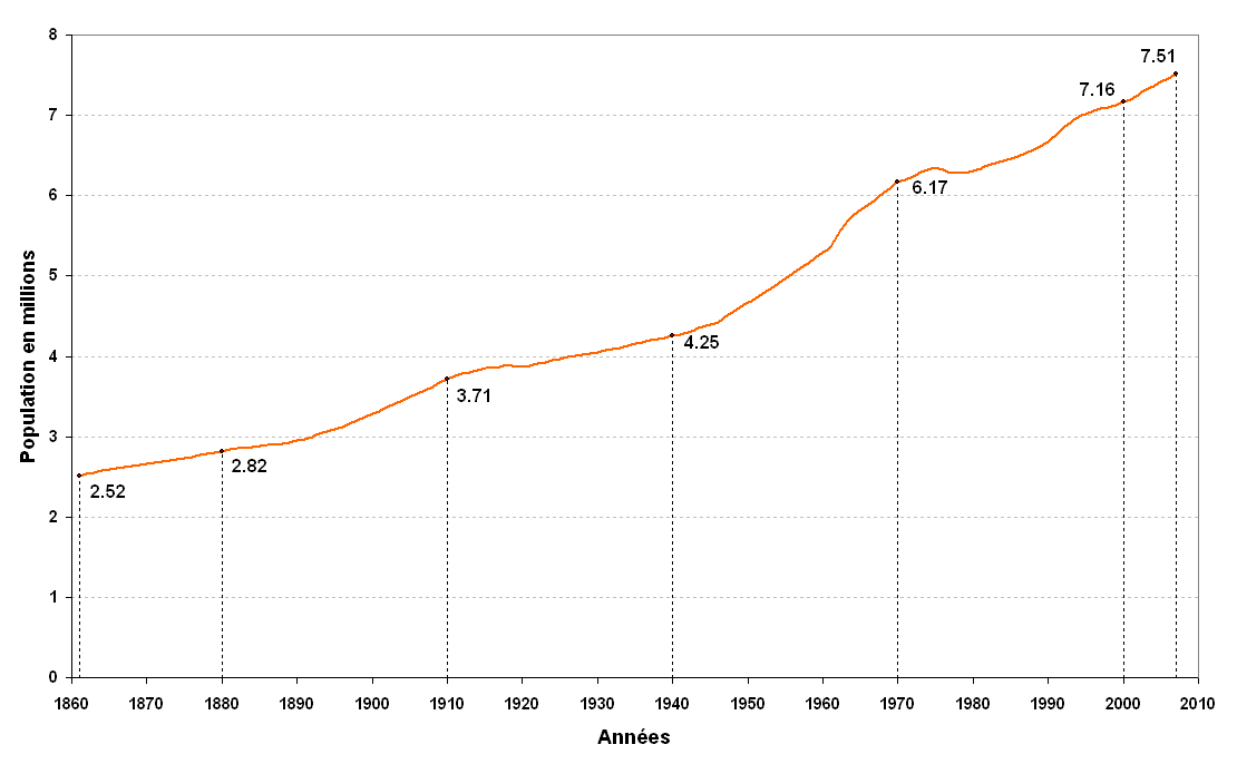 Evolution démographique de la Suisse de 1860 à 2007